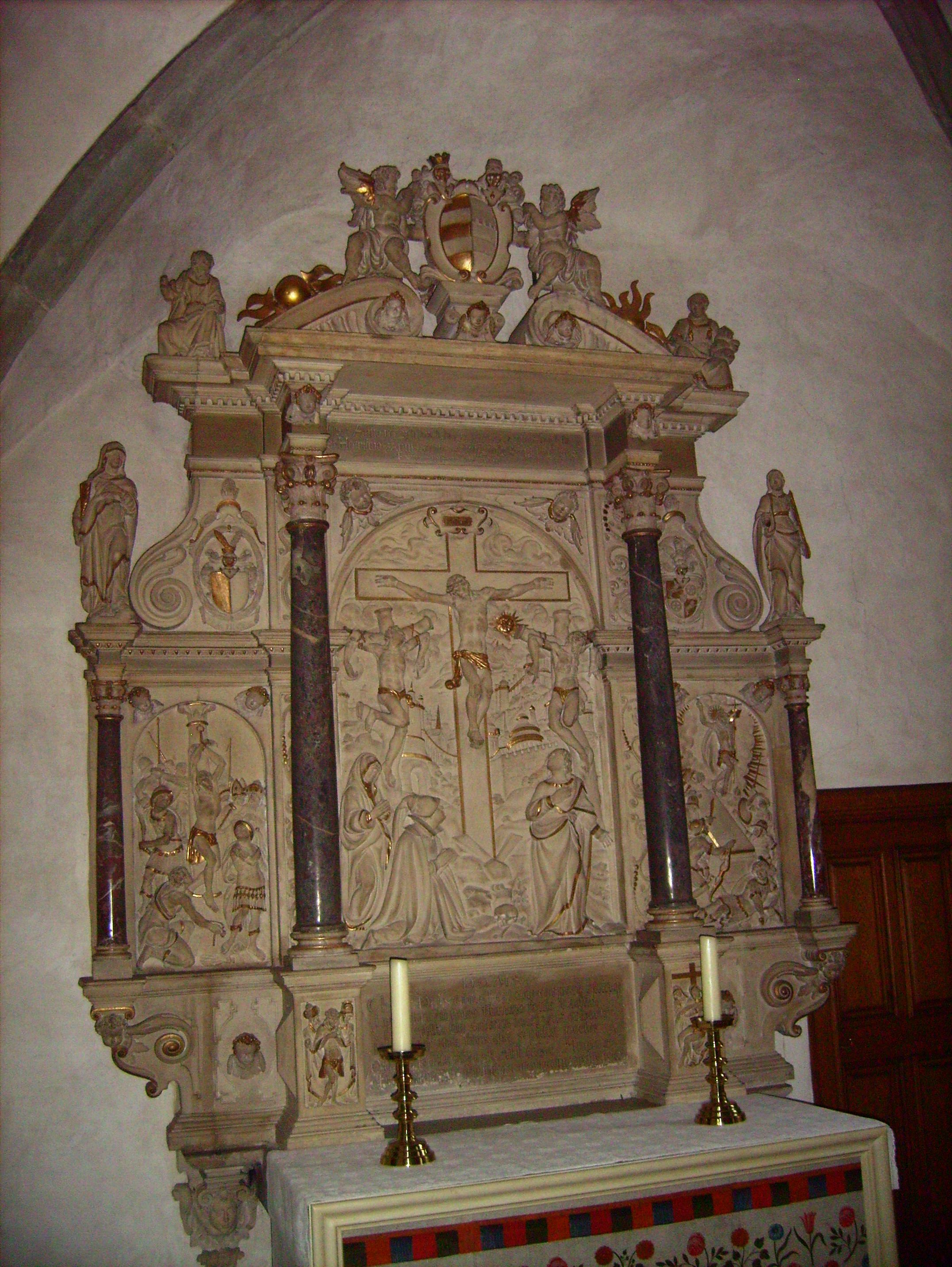 Kloster Oelinghausen - Epitaph für Ottilia von Fürstenberg, wahrscheinlich von Gerhard Gröninger